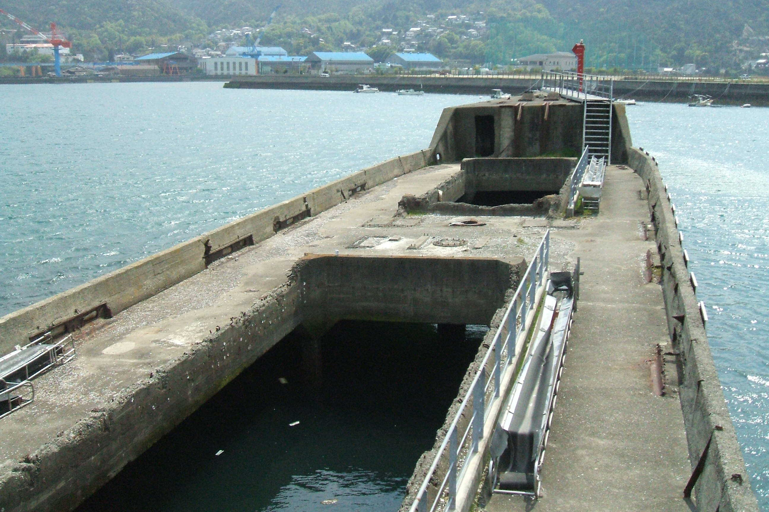 広島県 呉市 安浦町にある安浦漁港の防波堤に転用にされたコンクリート船、第二武智丸の船首部分。